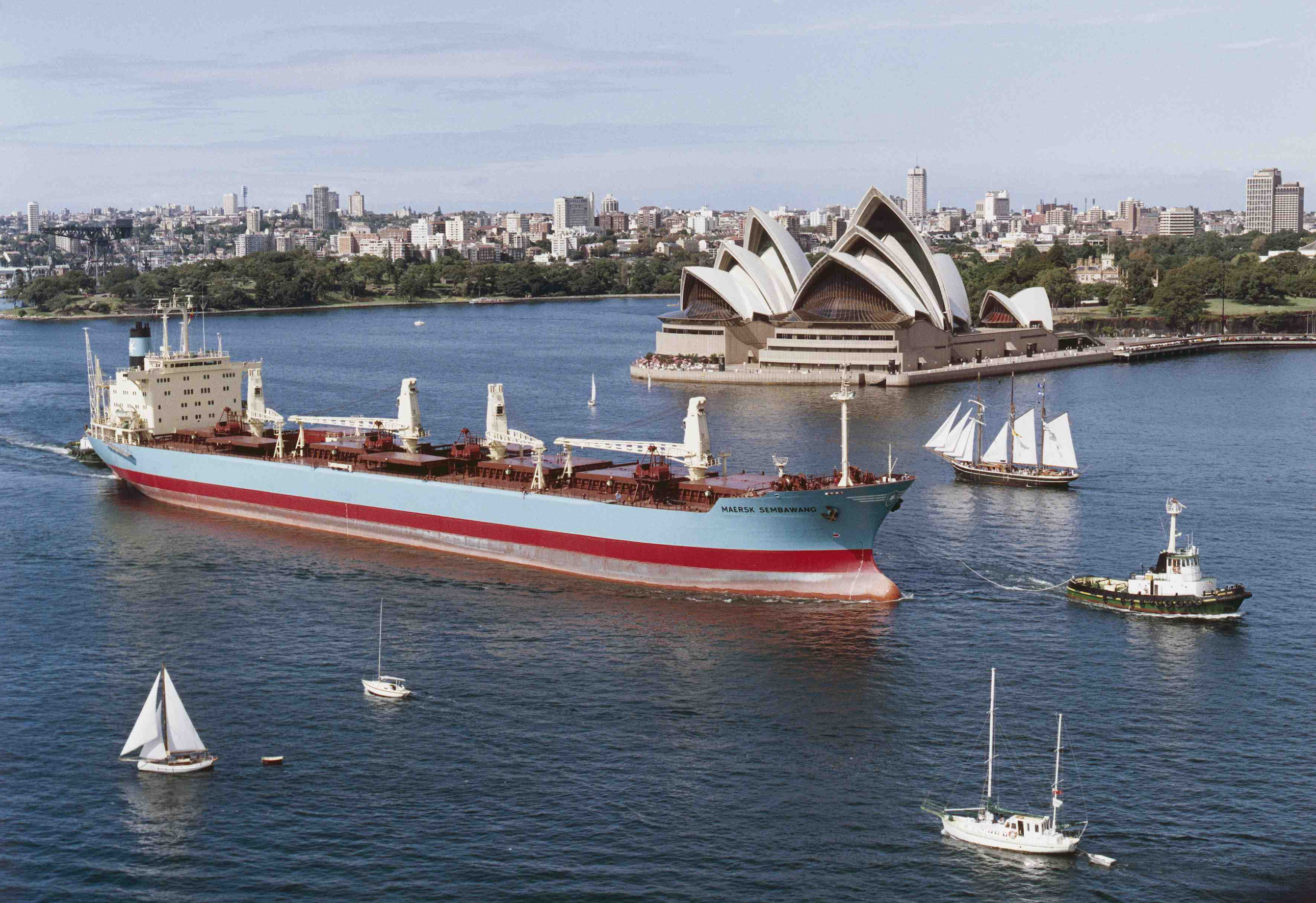 Mærsk Sembawang in Sydney